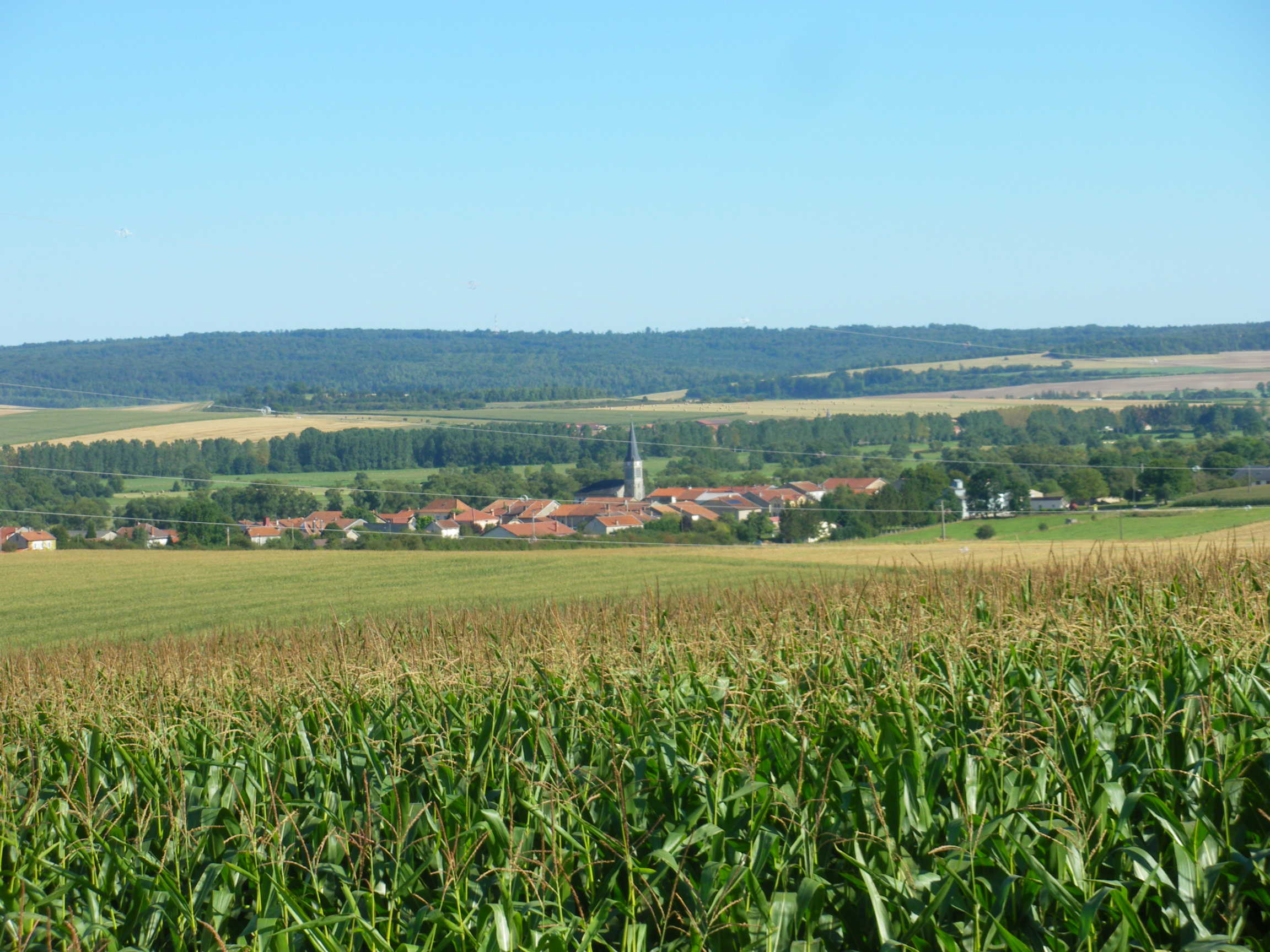 Bannoncourt , vue des hauteurs de la commune